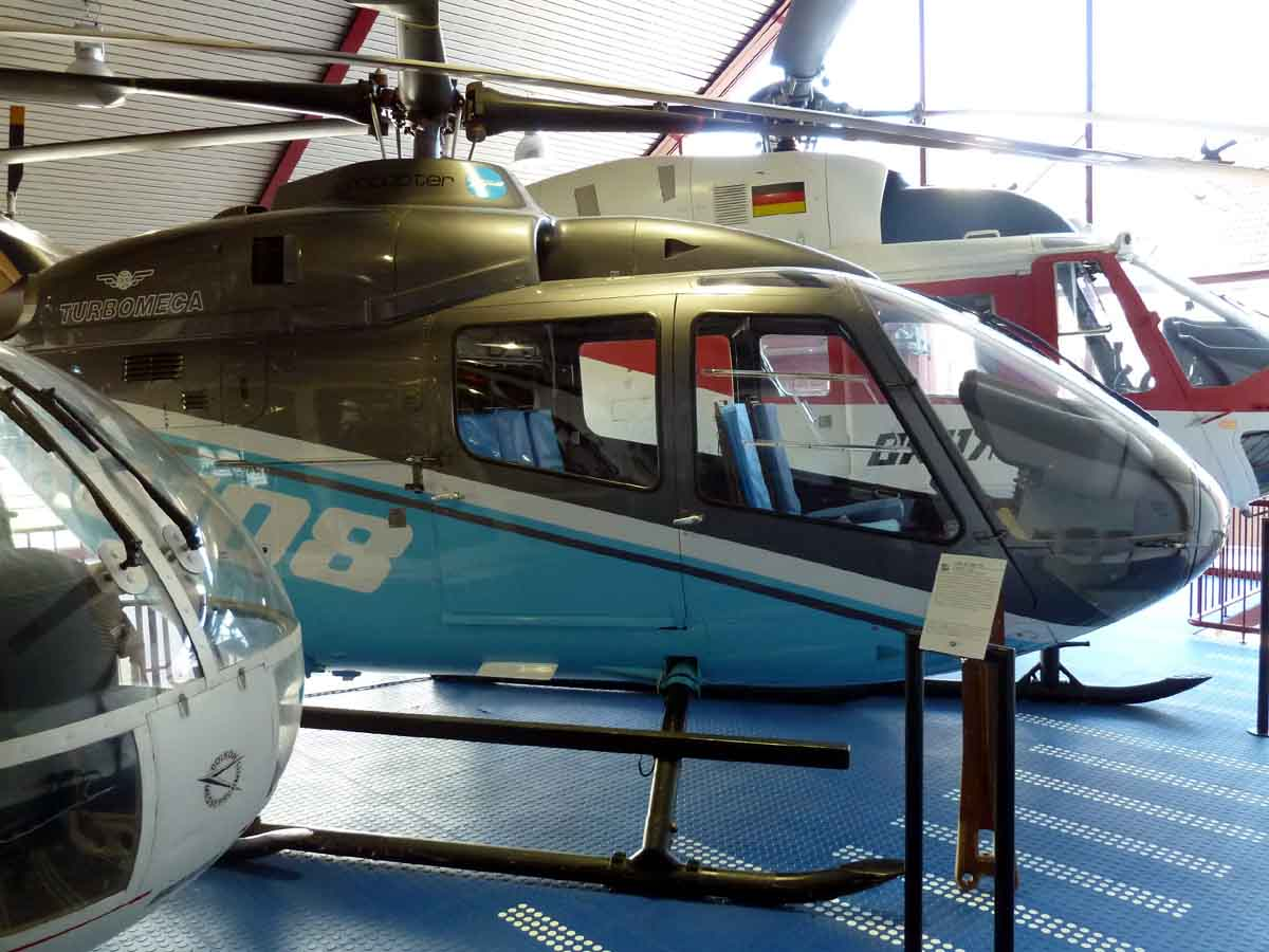 MBB Bo 108 VT2 im Hubschraubermuseum Bueckeburg